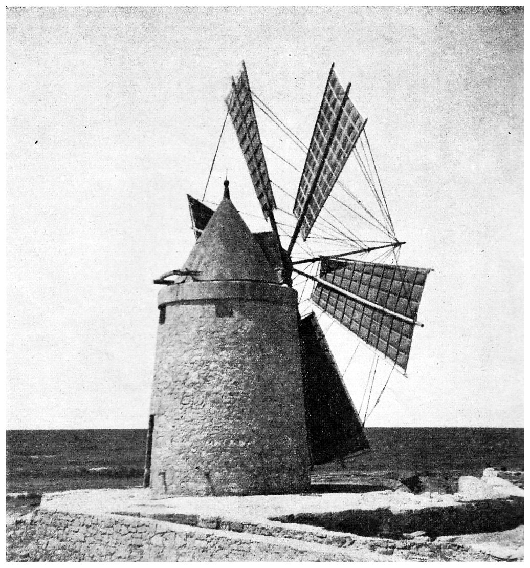 Il mulino a vento ai bordi del mare era usato per l'estrazione del sale. L'immagine in Sicilia Oggi, 1961, III, 17, p. 50 (AS Ragusa, Fondo Prefettura, Opuscoli, n. 513)